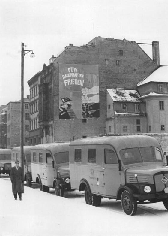 Zentralbild Junge 29.1.52 Neue Postautos. Immer wieder werden bei der Deutschen Post in Berlin neue LKWs in Dienst gestellt. Dadurch wird die Beförderung der Sendungen wesentlich verbessert und beschleunigt. Information added by Wikimedia users.